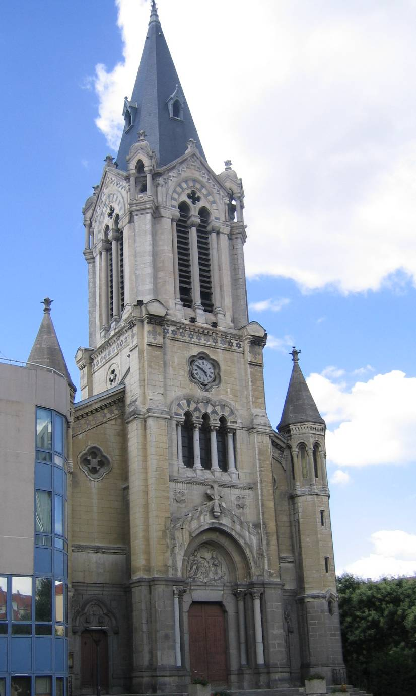 Église Saint-Martin à Oullins.